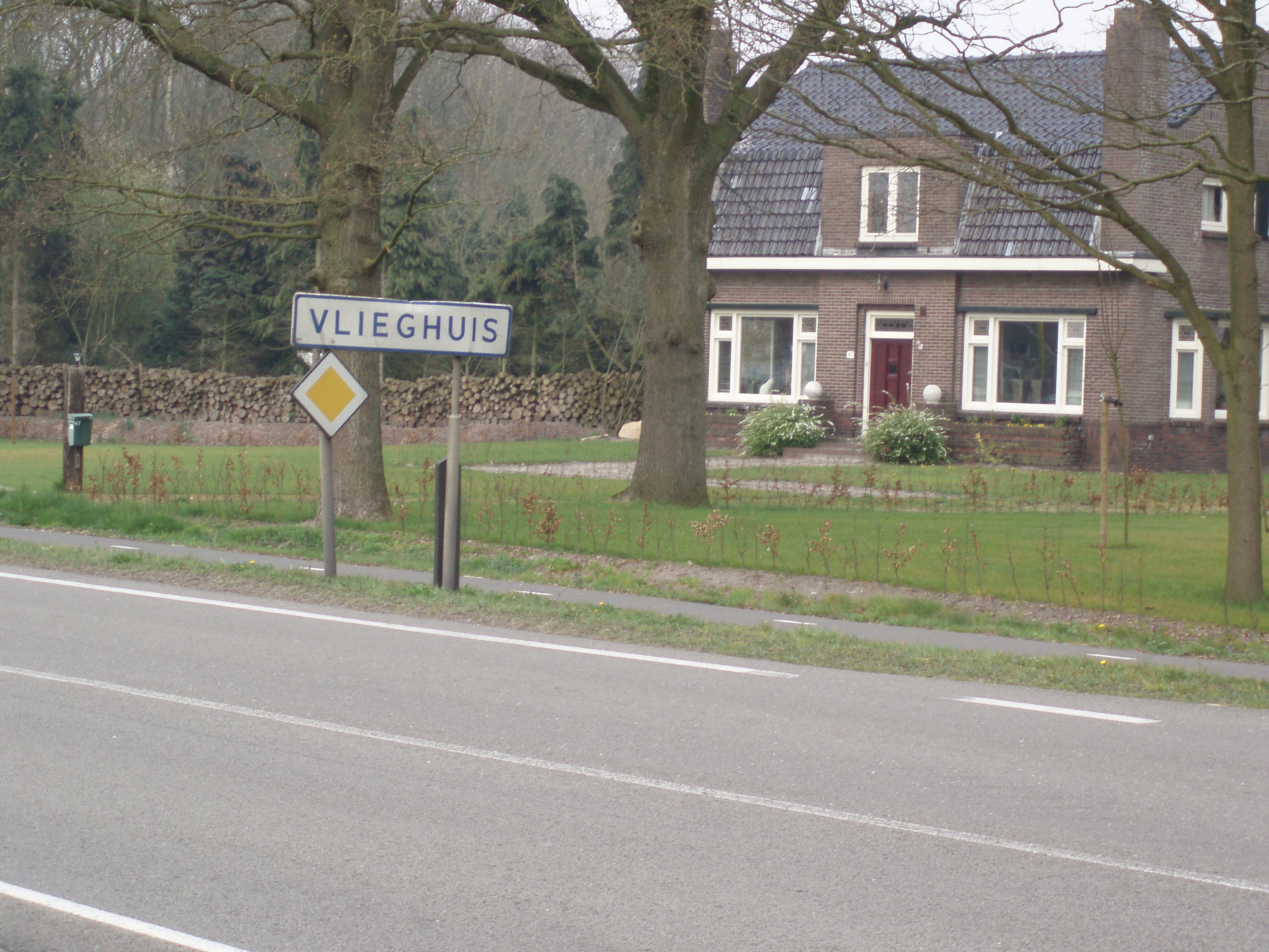 Vlieghuis in de gemeente Coevorden.